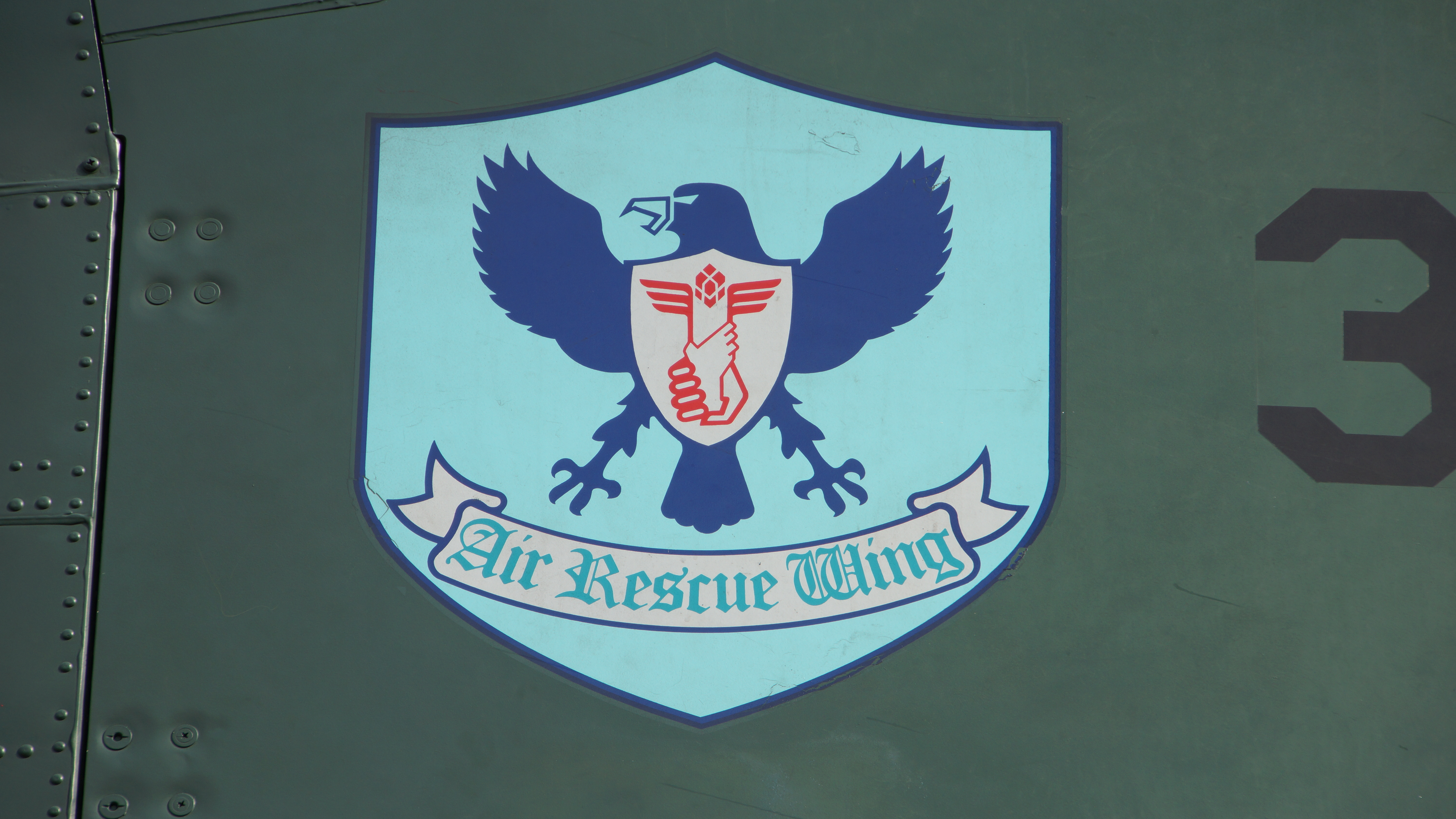 航空自衛隊 CH-47J（LR）輸送ヘリコプター（37-4489号機） 後部パイロン左側に描かれた航空救難団部隊章。2017年11月25日 春日基地にて。